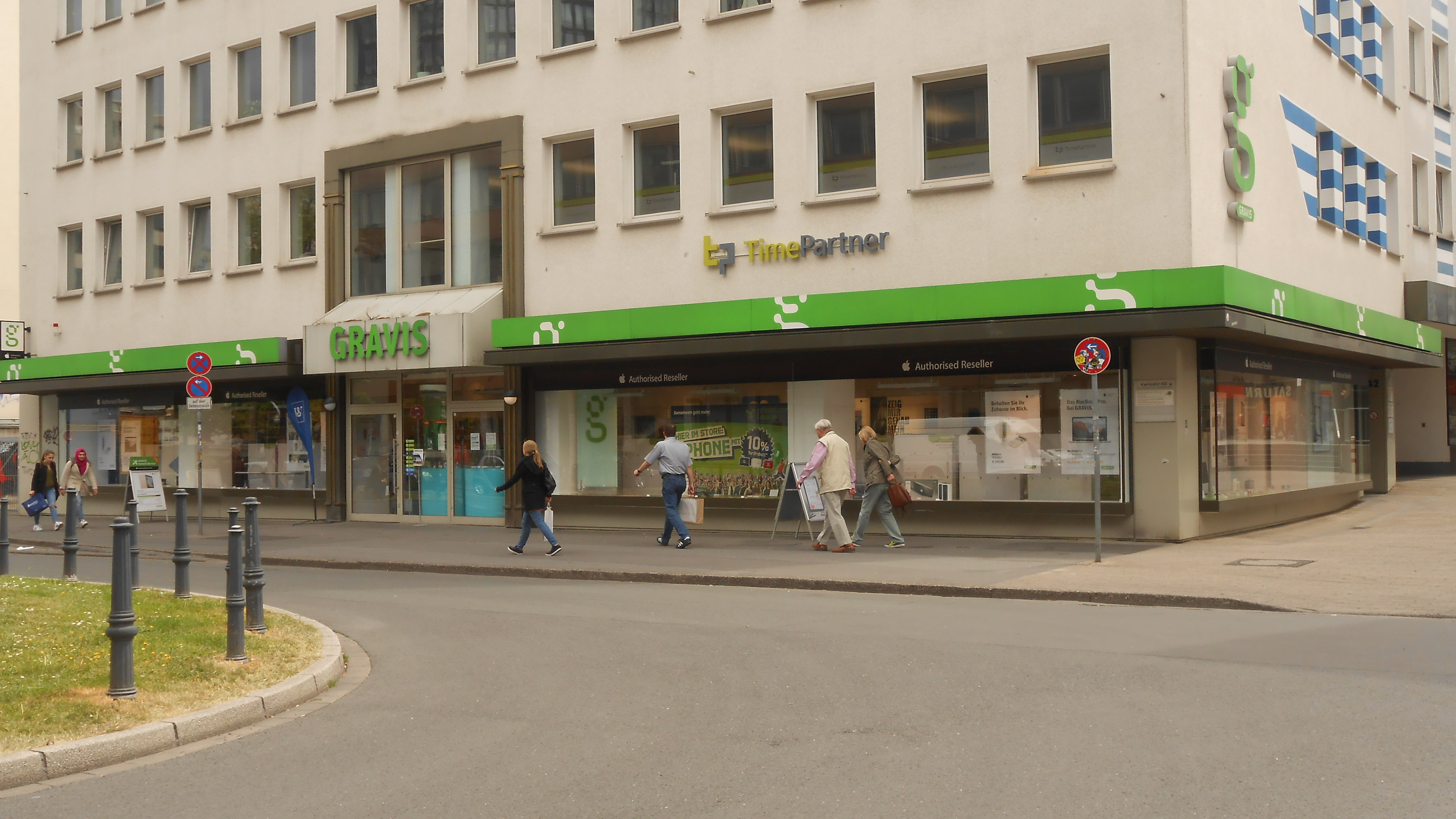 Der Gravis-Laden in der Dortmunder Innenstadt, an der Kampstraße (neben der Petrikirche).